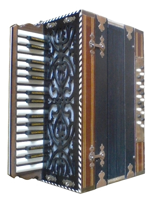 გარმონი (ოსტატი კ.ბაღდასაროვი)